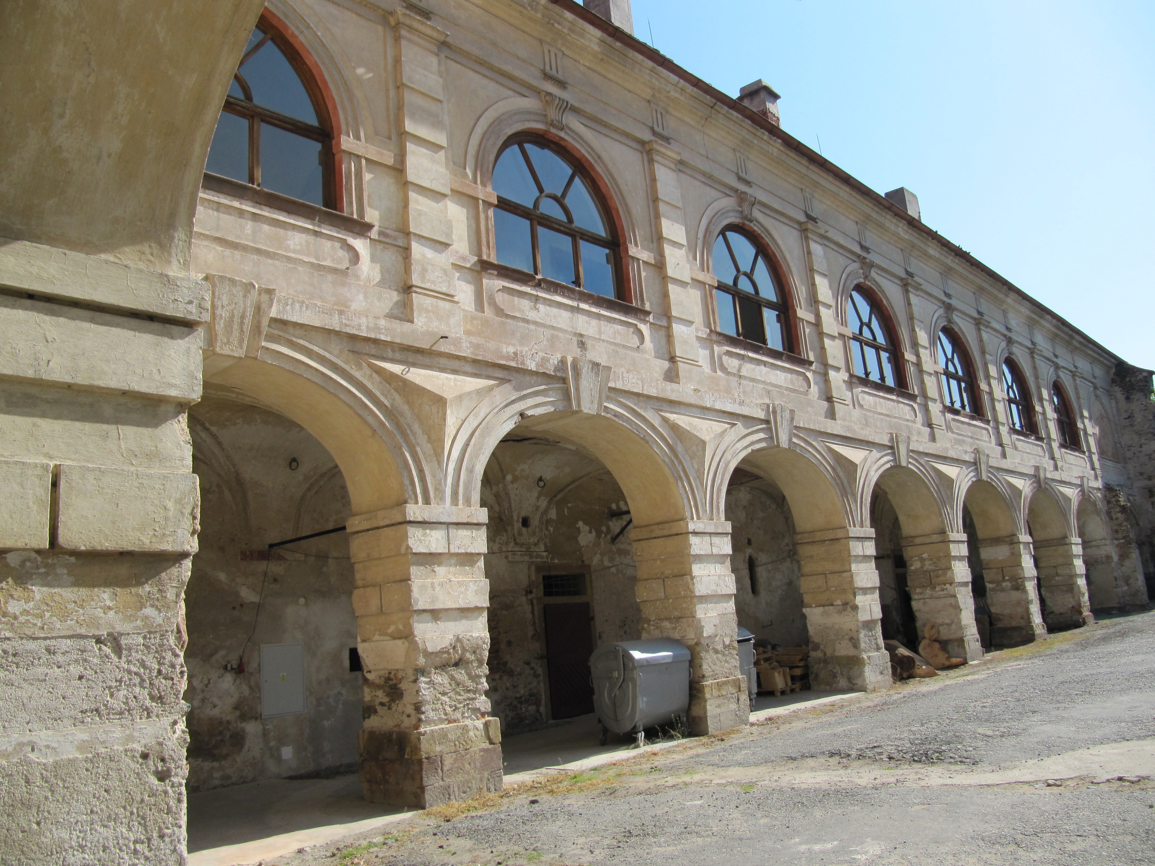 Rataje nad Sázavou